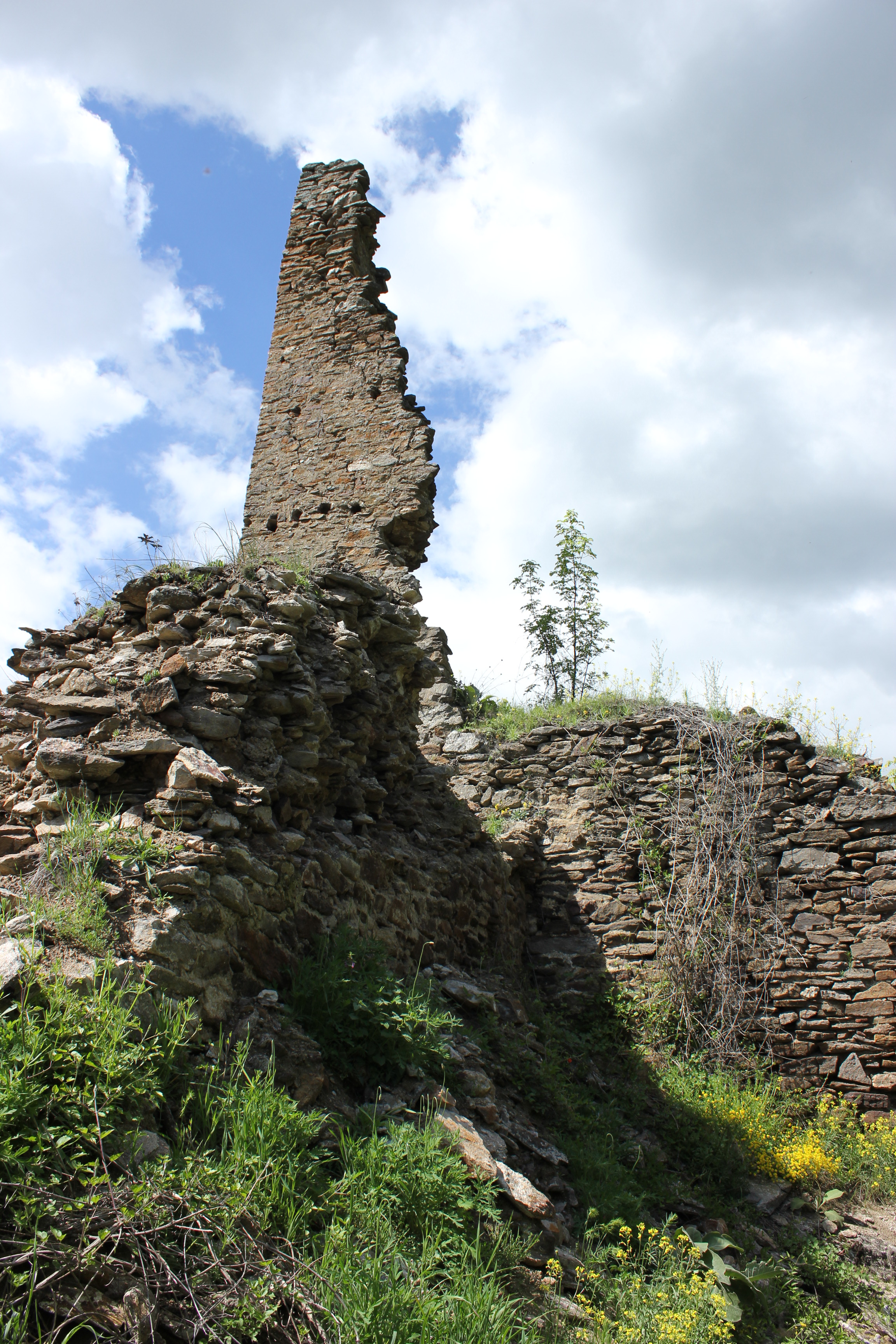 Квадратна отбранителна кула в най-северната част на крепостта Марково кале, Враня, Сърбия.